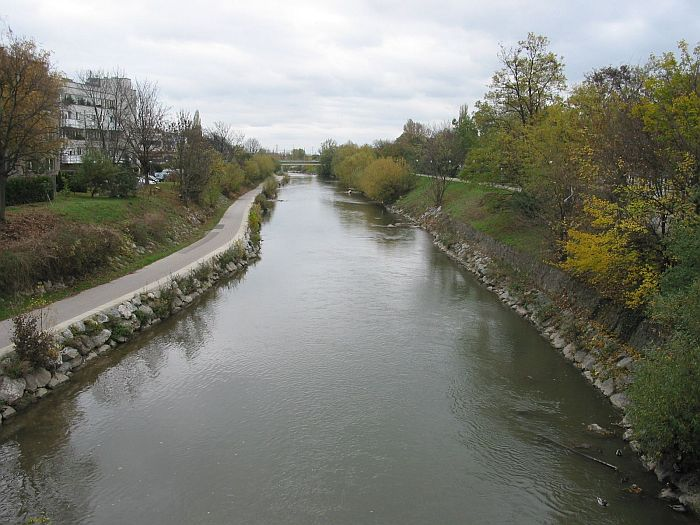 Fluss Schwechat in Schwechat (Brücke Wiener Straße B10 flussab)